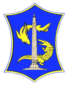 Surabayas logo.